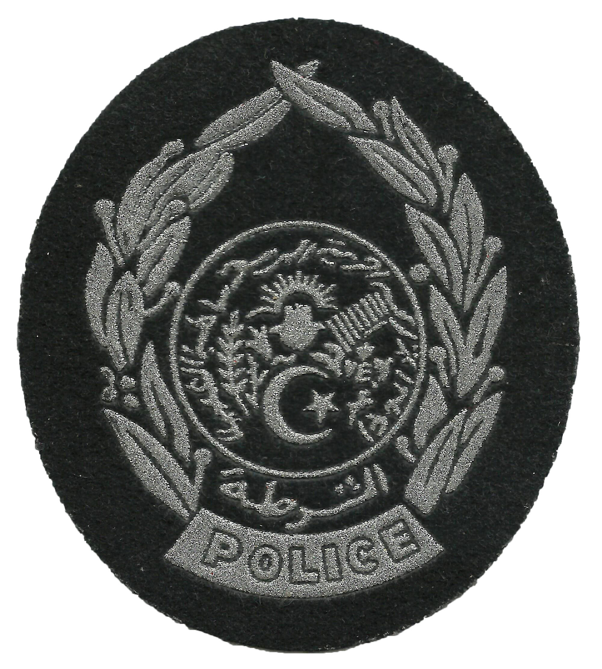 Politie patch uit Algerije